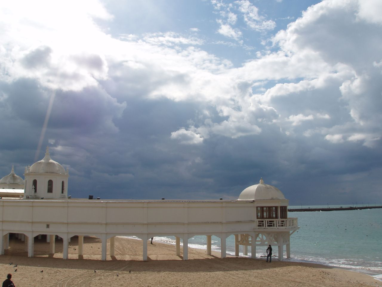 La Caleta, Balneario